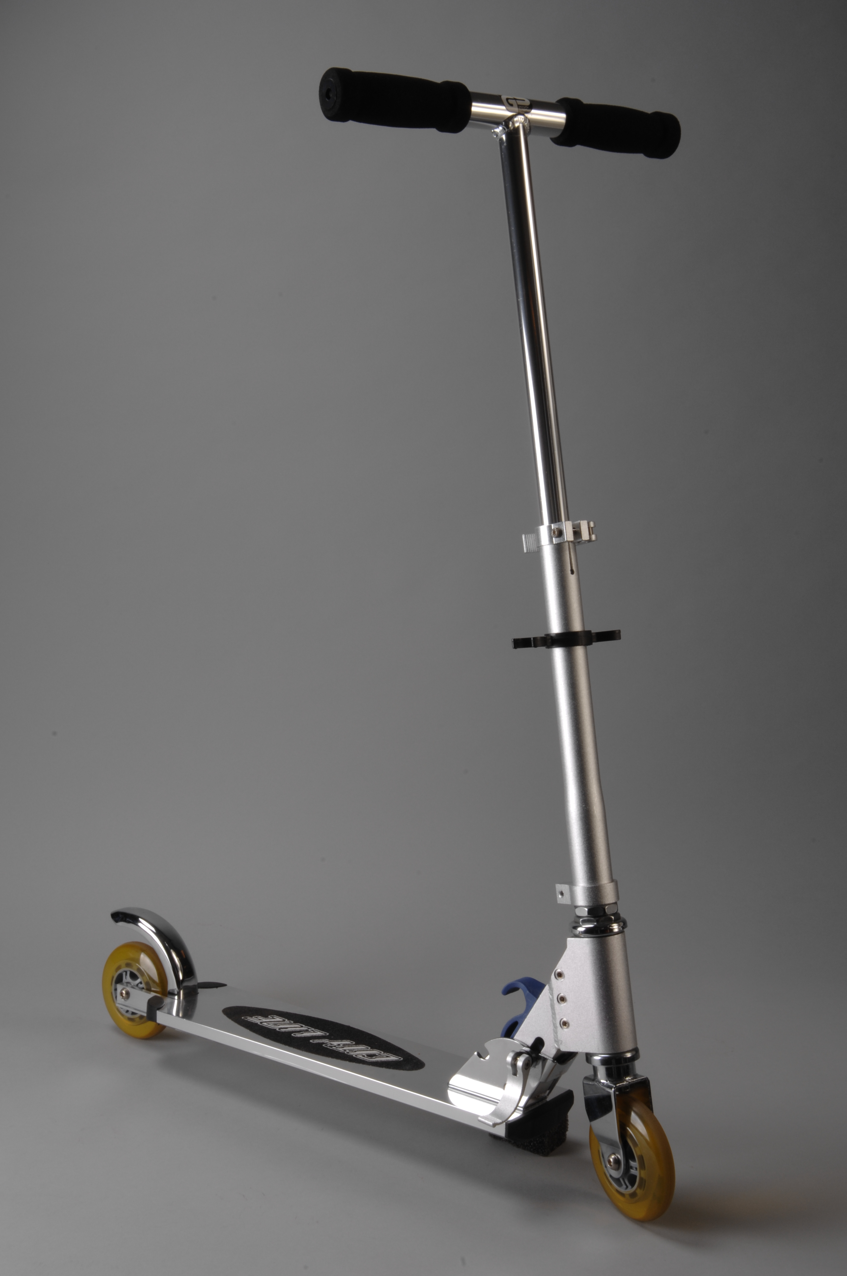 Objectgegevens Titel: Inklapbare aluminium step “City Line”, ook bekend als flitsstep, kickboard of skatescooter Beschrijving: Inklapbare step met treeplank net boven de grond, twee kunststof wieltjes, rem boven achterste wiel, verstelbaar stuur met twee handvatten. Onder de treeplank is een zakje met imbussleutel bevestigd. In de bijbehorende doos is een Duitse gebruiksaanwijzing aanwezig. Trefwoorden: autoped, transportmiddel, vervoermiddel Opschrift / merk: Op treeplank: "City Line". Op stuur: sticker "RWTüV Geprüfte Sicherheit". Onderzijde treeplank: "Dapo Leuchten Vertriebs-GmbH Modell: CR2 Bad Schönbron, Germany" en sticker "RWTüV Geprüfte Sicherheit". Vervaardiger: Dapo Leuchten Vertriebs-GmbH Plaats vervaardiging: Duitsland, Bad Schönbron Datering: 2000 Materiaal: aluminium, kunststof, metaal Afmetingen: (cm) uitgeklapt: hg 93,0 / br 10,0 / lg 67,0 / doos: hg 20,0 / br 11,5 / lg 63,0 Associatie: flitsstep, skatescooter, kickboard, Micro Skate Scooter, Ciro, City Roller, vrije tijd, transport, persoonlijk attribuut, recreatie Inventarisnr: Museum Rotterdam 78440-A-C